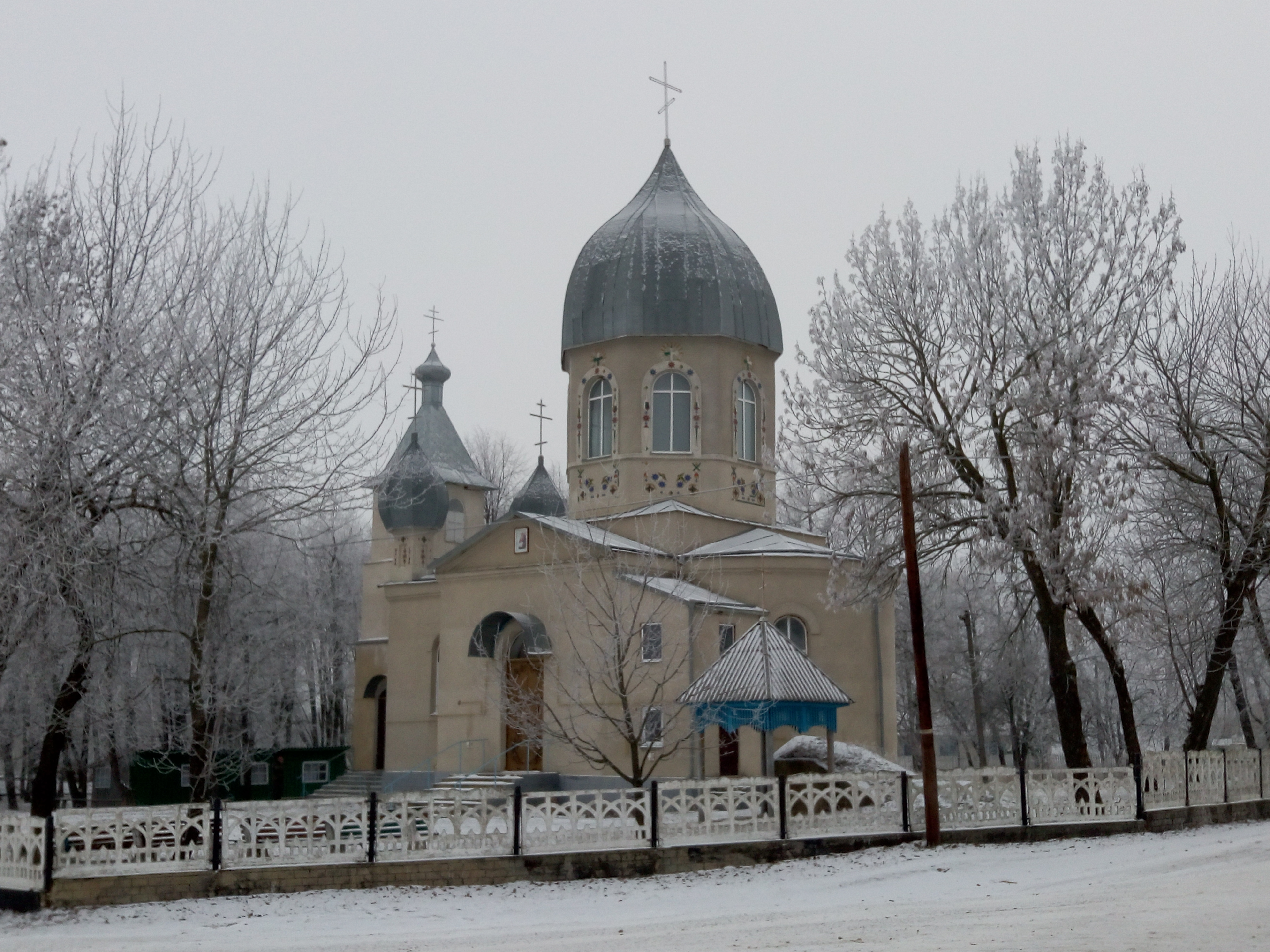 Храм на честь Апостола і Євангеліста Іоанна Богослова в с. Рудківці Новоушицького району Хмельницької області.